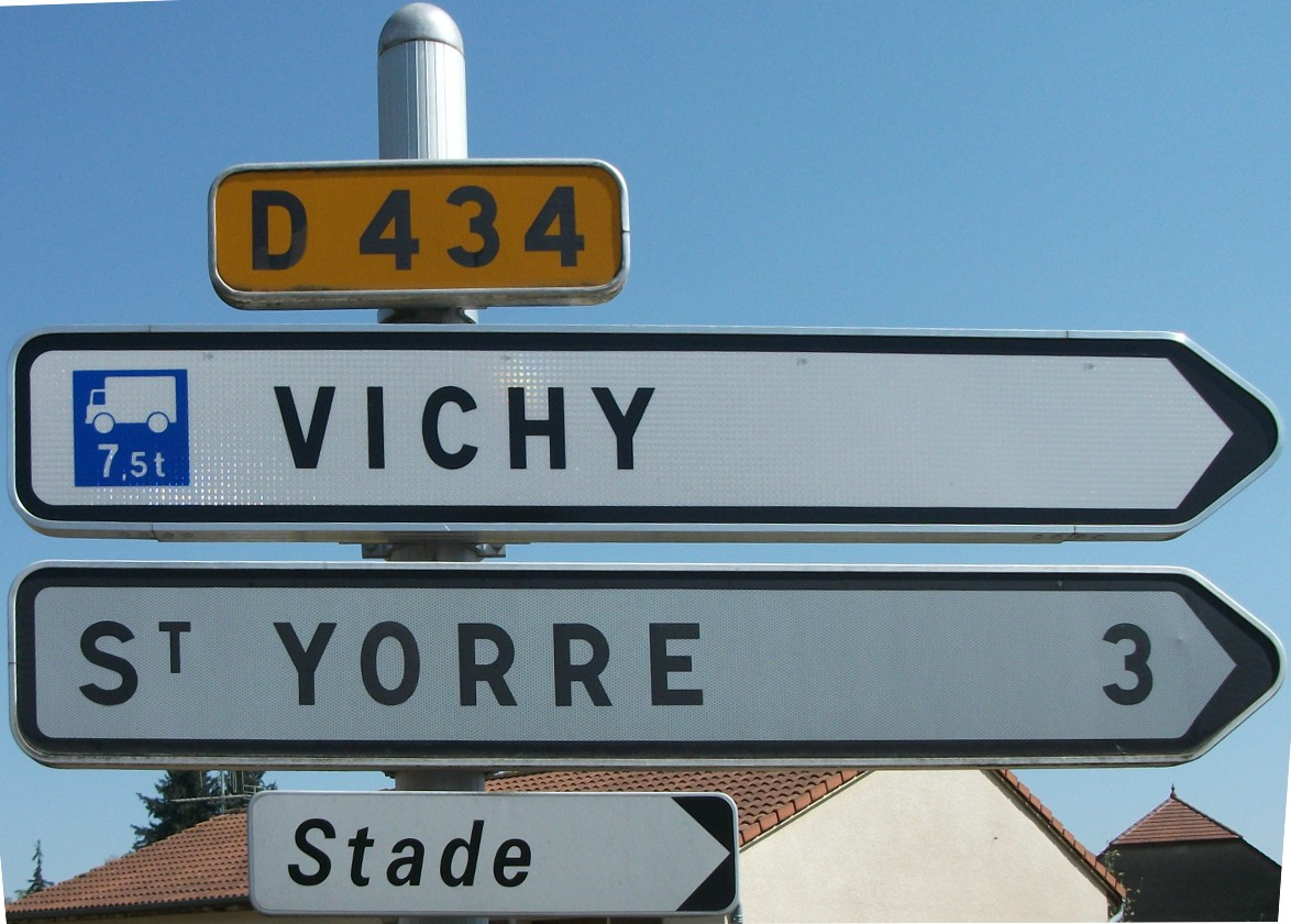 Panneaux de la route départementale 434 à La Poivrière (commune de Saint-Sylvestre-Pragoulin, Puy-de-Dôme, Auvergne, France). Retouche avec GIMP (perspective, matrice de transformation {0.9012, 0.10052, 58; -0.03263, 1.02886, 58; -3E-5, 1.3E-4, 1}) Le premier panneau indique que la direction de Vichy est atteinte par la même route qui permet de rejoindre Saint-Yorre. Ici, la direction de Vichy est conseillée pour les véhicules de transport de marchandises dont le poids total autorisé en charge ou le poids total roulant autorisé excède 7,5 tonnes. Or ce symbole ne respecte pas les dimensions imposées… Pour illustrer Symbole routier en France